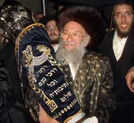 רבי אלתר כהנא. האדמו"ר מזידיטשוב-ספינקא בירושלים